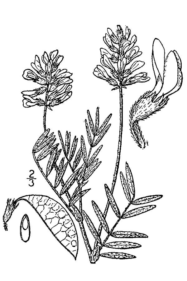 Astragalus australis (L.) Lam. - Indian milkvetch